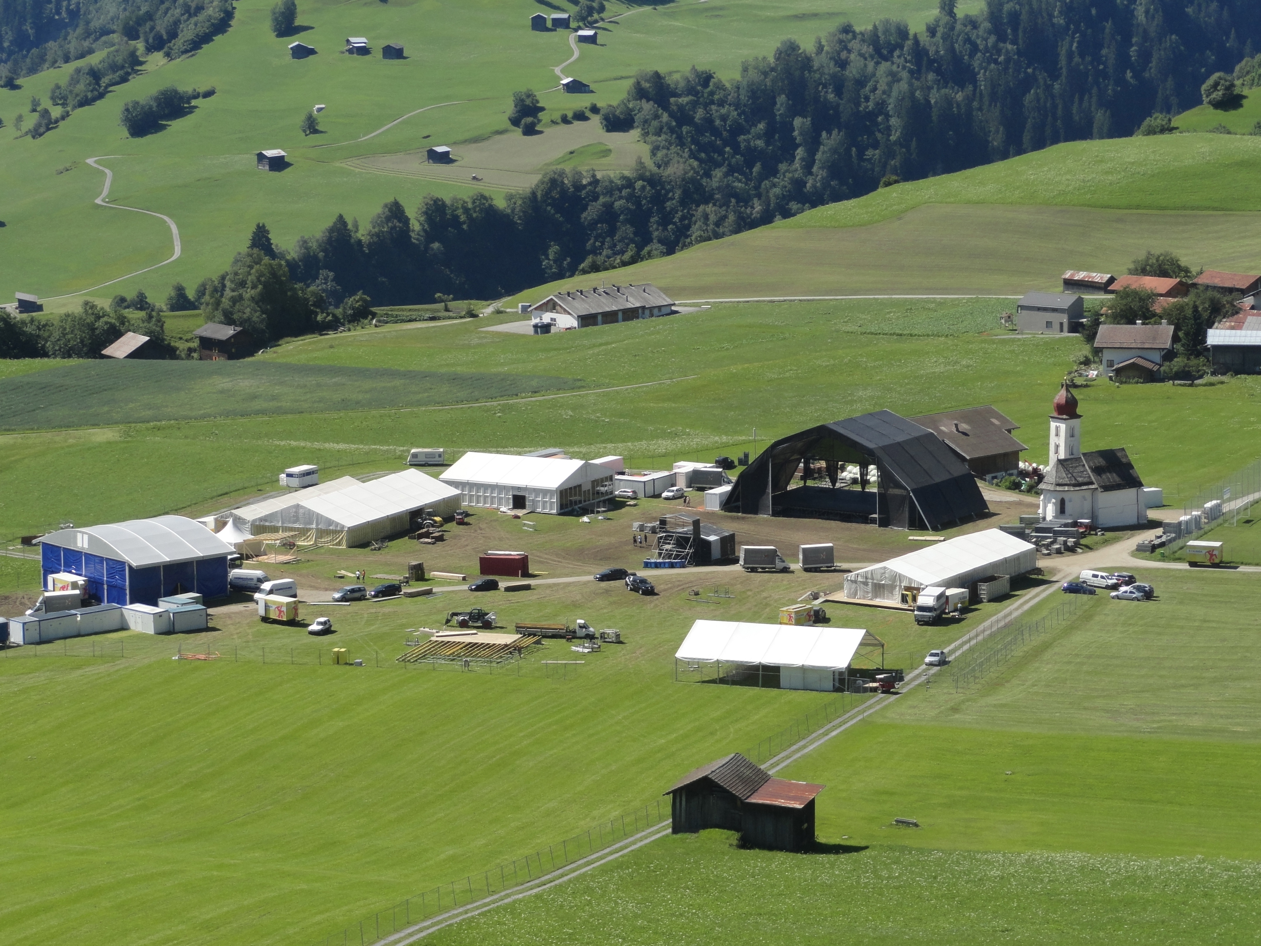 Degen GR